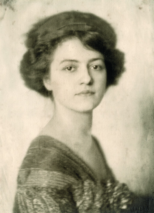 Růžena Zátková, malířka a sochařka